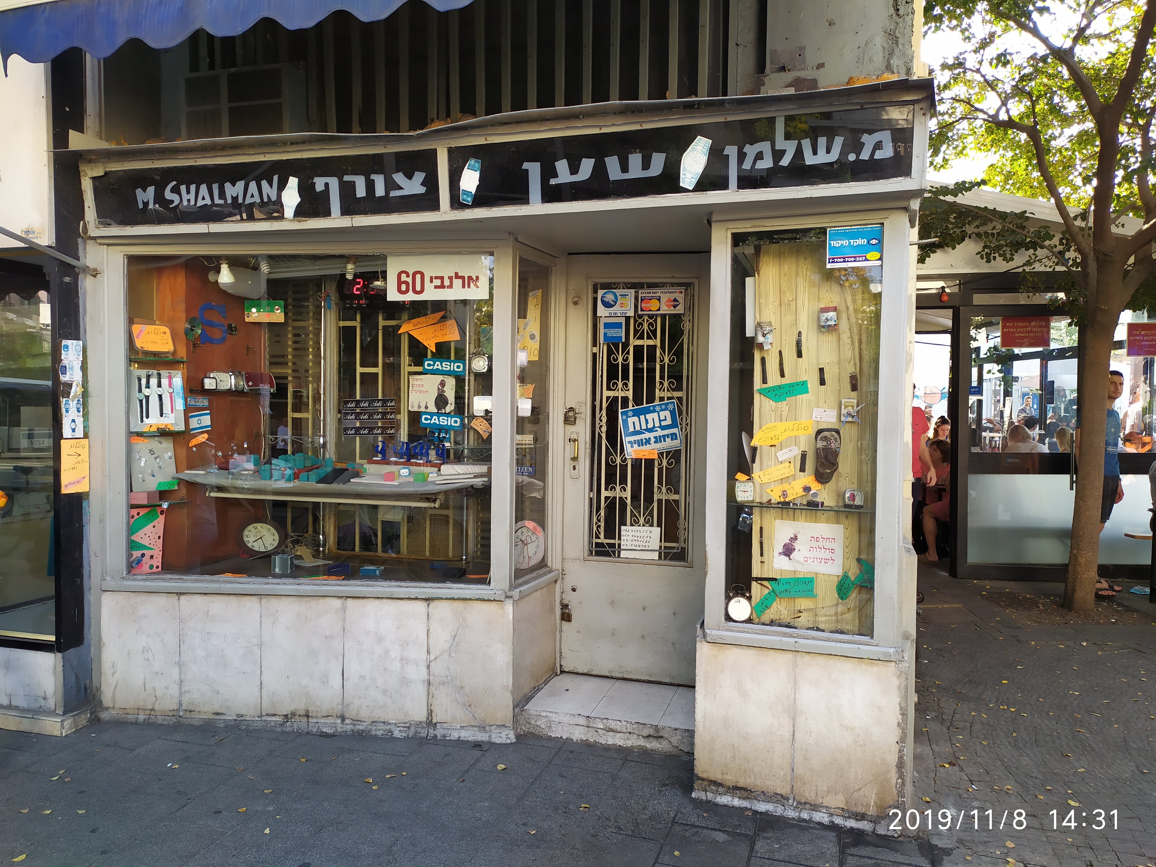 חלון ראווה של שען וצורף רחוב אלנבי 60 תל אביב